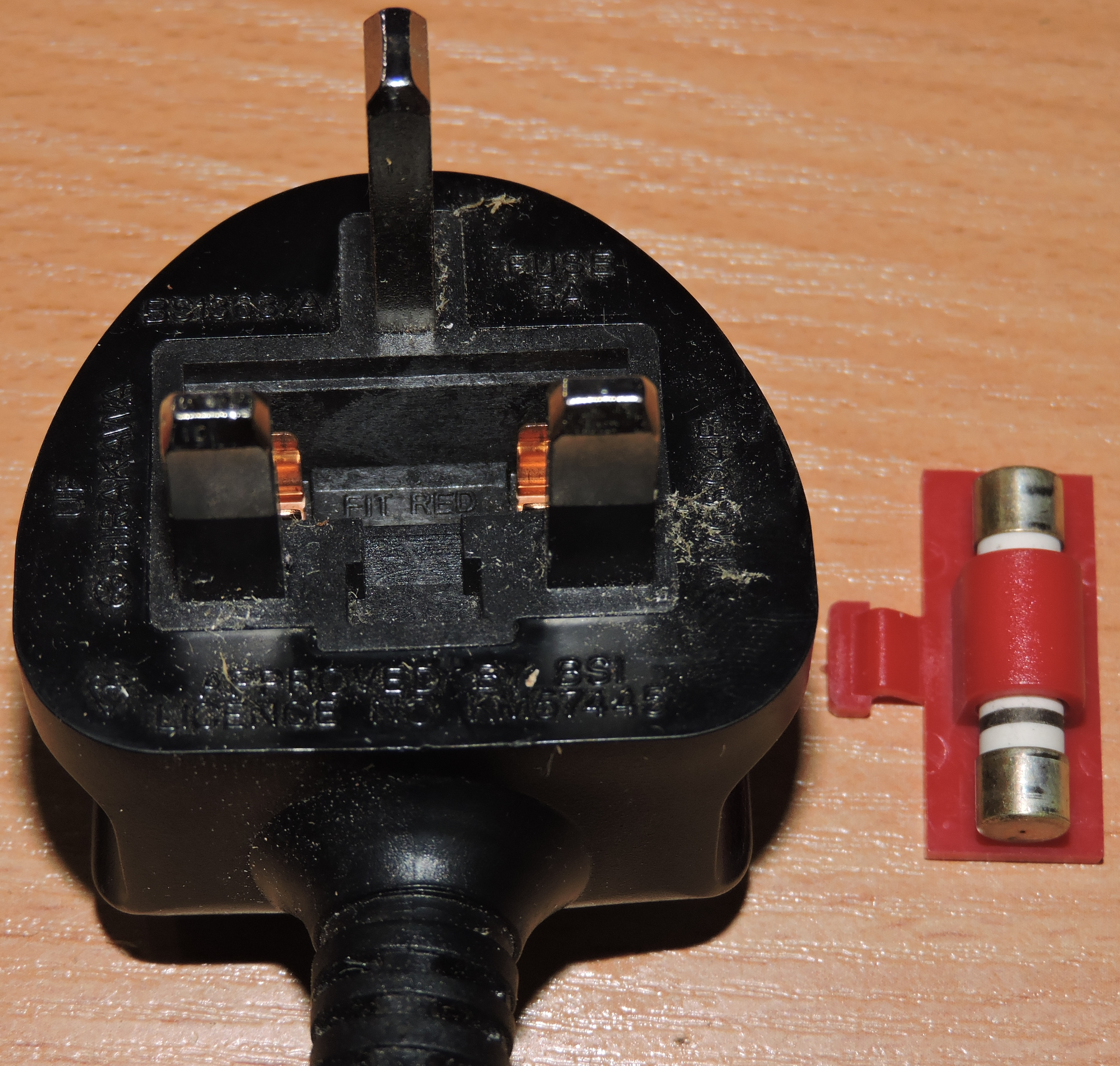 Вилка типа BS 1363 с предохранителем